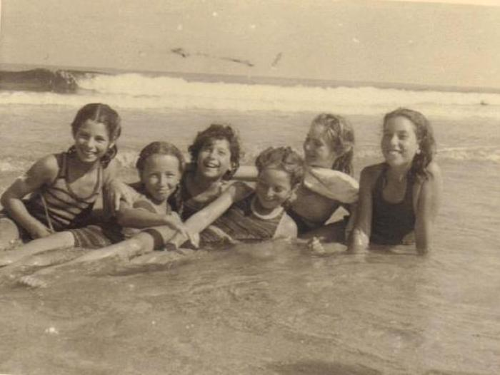 בנות המחזור הראשון של ילדי ניר-עם בקייטנה. חדווה שוורצמן,, עתליה מן, נורית (ימפולסקי) שמואלי, רותי (שטיינברג) צורי תמר פנקנזון.